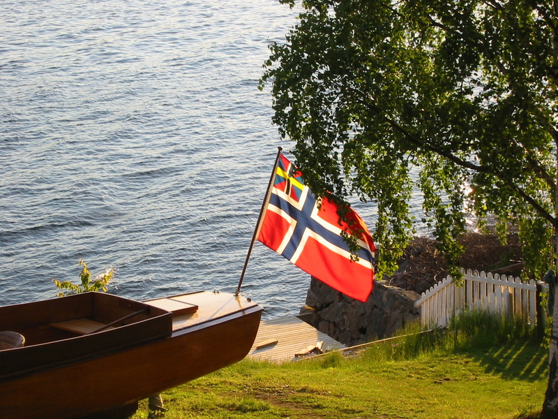 Old Norwegian union flag